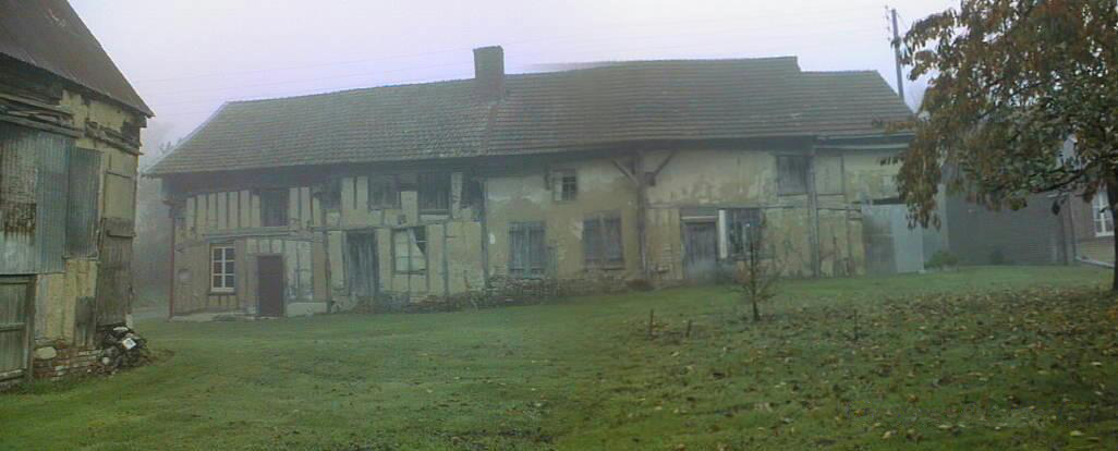 Ensemble d'habitations et locaux agricoles. Chappes Ardennes France raccord panoramique de 2 photos